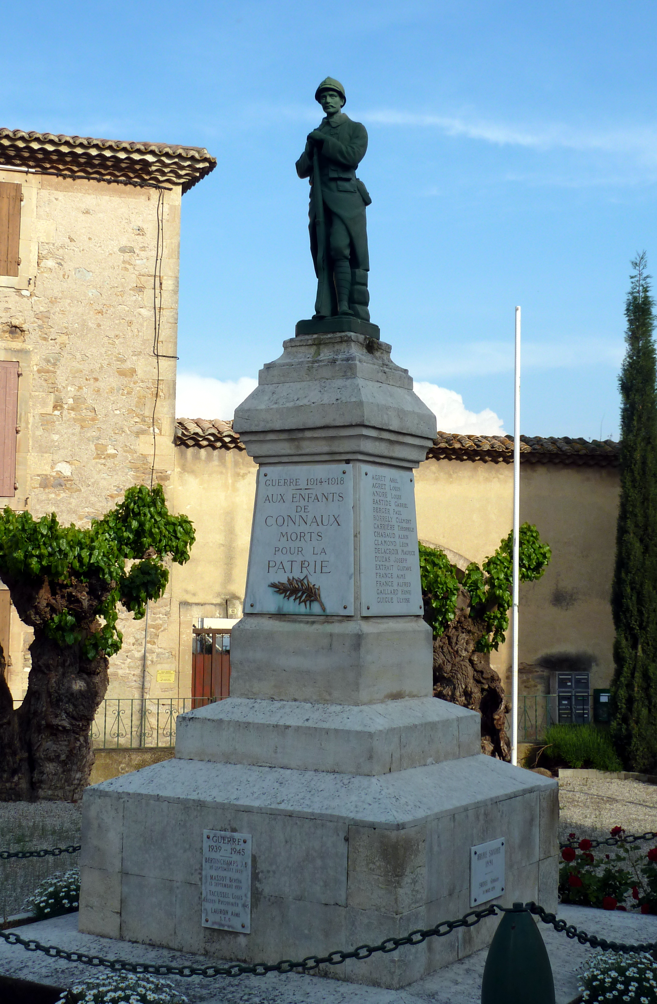 Monument aux morts de la guerre de 1914-1918 de Connaux datant du 1er quart 20e siècle, inscrit à l'Inventaire général (base Palissy, IM30000535).